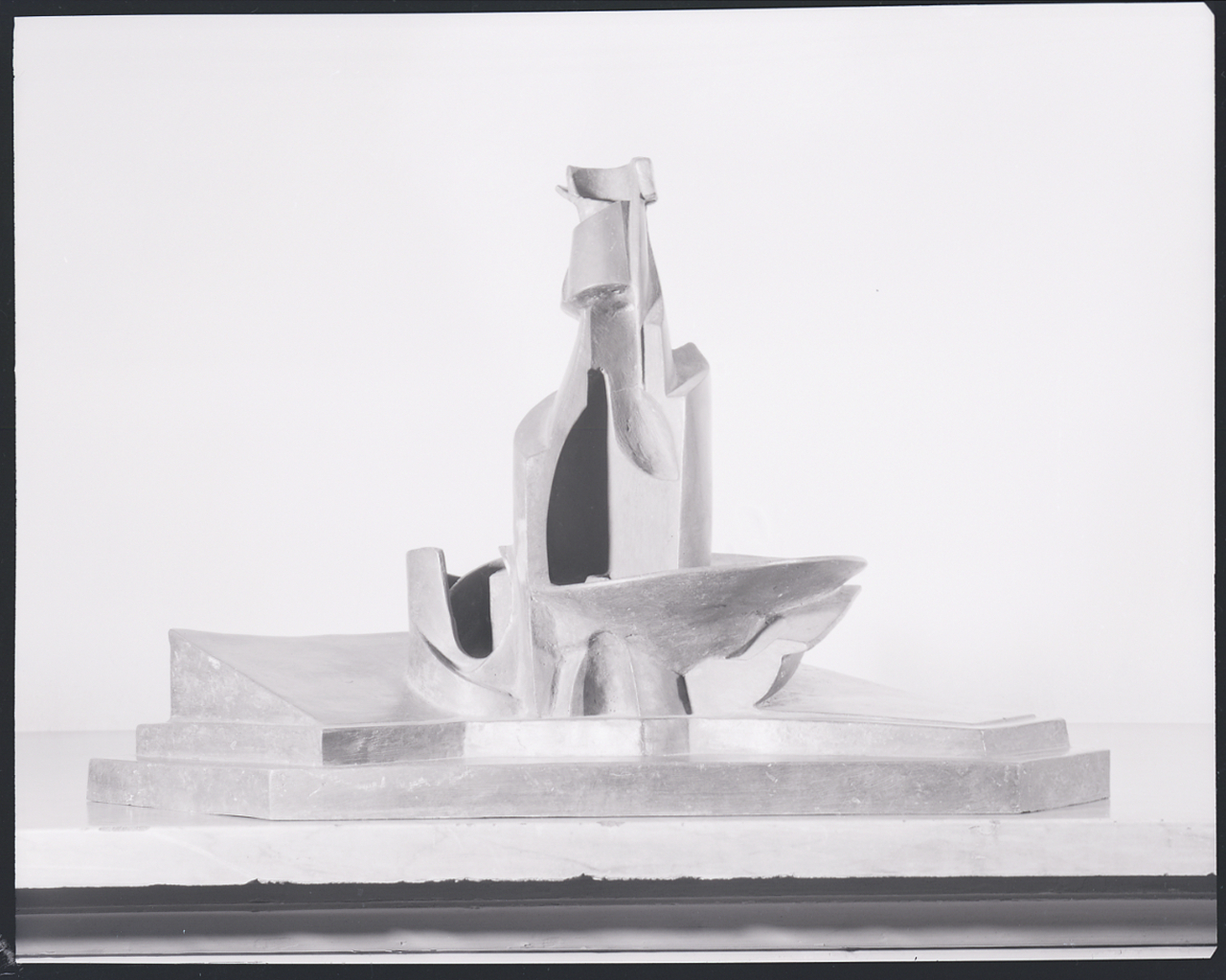 Milano. Galleria d'Arte Moderna. Umberto Boccioni, "Sviluppo di una bottiglia nello spazio", 1913, bronzo; "Forme uniche dellacontinuità nello spazio", 1913, bronzo. Servizio fotografico : Milano, 1969 / Paolo Monti. - Buste: 16, Fototipi: 19 : Negativo b/n, gelatina bromuro d'argento/ pellicola ; 10x12. - ((Serie costituita da 16 buste sciolte di negativi identificati con i nn.: 14862, 14863, 14863bis, 14864, 14864bis, 14865, 14865bis, 14866, 14867, 14868, 14869, 14870, 14871, 14871bis, 14872, 14872bis. - Occasione: Documentazione per la pubblicazione: Cecchi Emilio, Sapegno Natalino (a cura di), "Storia della Letteratura Italiana", 9 voll., Milano, Garzanti, 1966 e segg. - Fonte: Monografia di Cecchi Emilio, Sapegno Natalino (a cura di): Storia della Letteratura Italiana, 9 voll., Milano, Garzanti (1966 e segg.). - Fonte: Agenda di Paolo Monti: Monti/ 3 aprile 1966 - 9 marzo 1971/ 12421-16823 (1966-1971), presso Archivio Paolo Monti